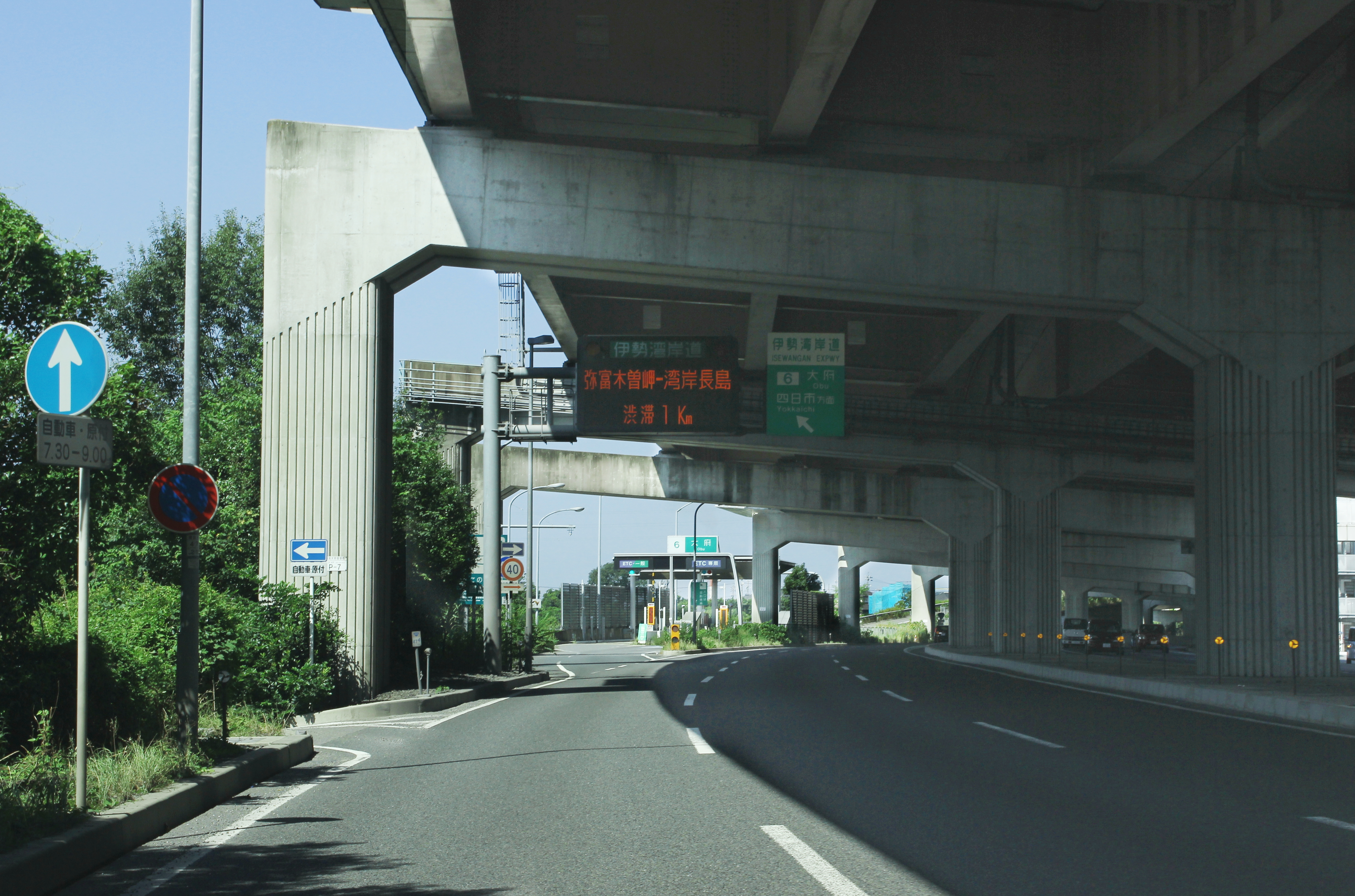 伊勢湾岸自動車道（第二東名）大府インターチェンジ（四日市方面）入口